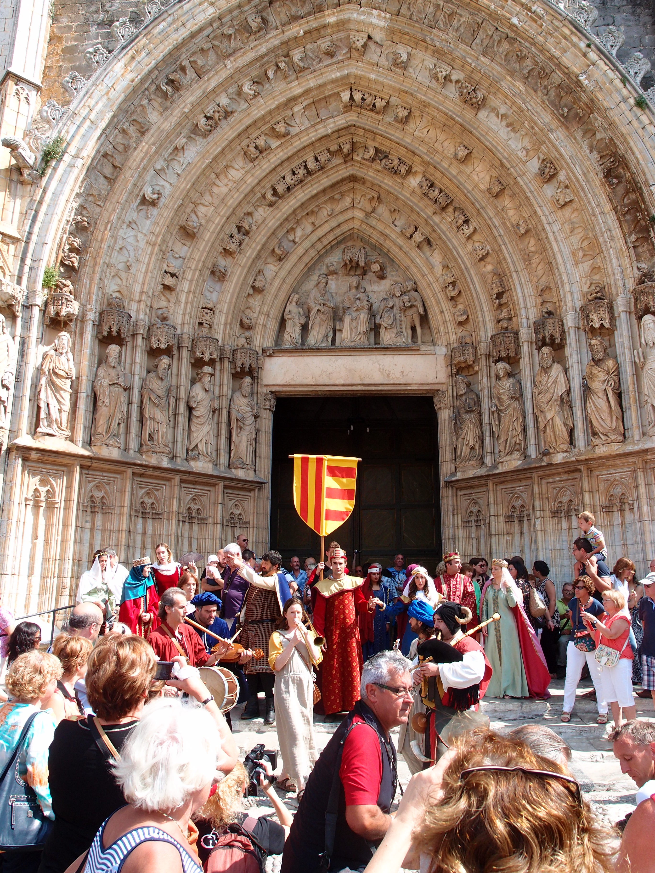 Festival Terra de Trobadors/2014 in Castelló d’Empúries (Katalonien/Spanien) Datum: 14.09.2014 Urheber: M. Pfeiffer alias Benutzer:Gordito1869 Quelle: privates Fotoarchiv des Urhebers